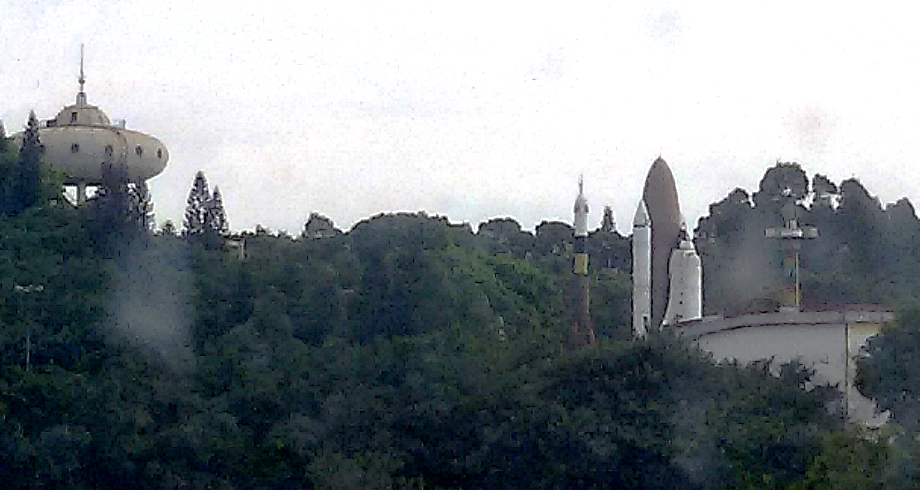 粵語: 广州航天奇观停业后，净低啲残骸。